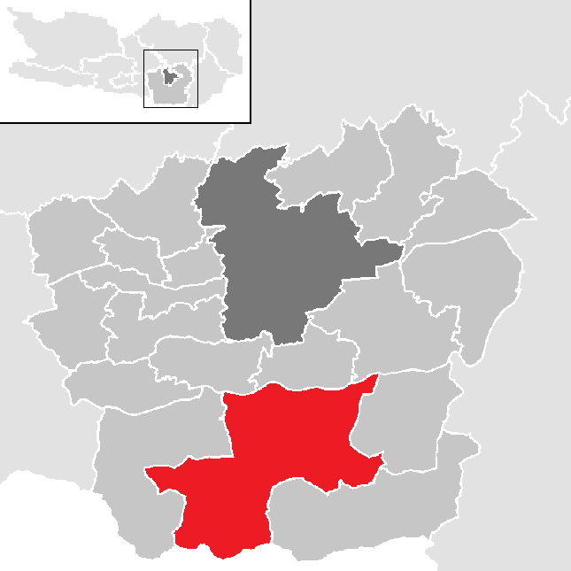 Bezirk Klagenfurt-Land